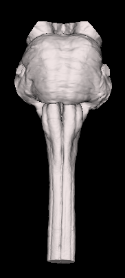 Anatorama